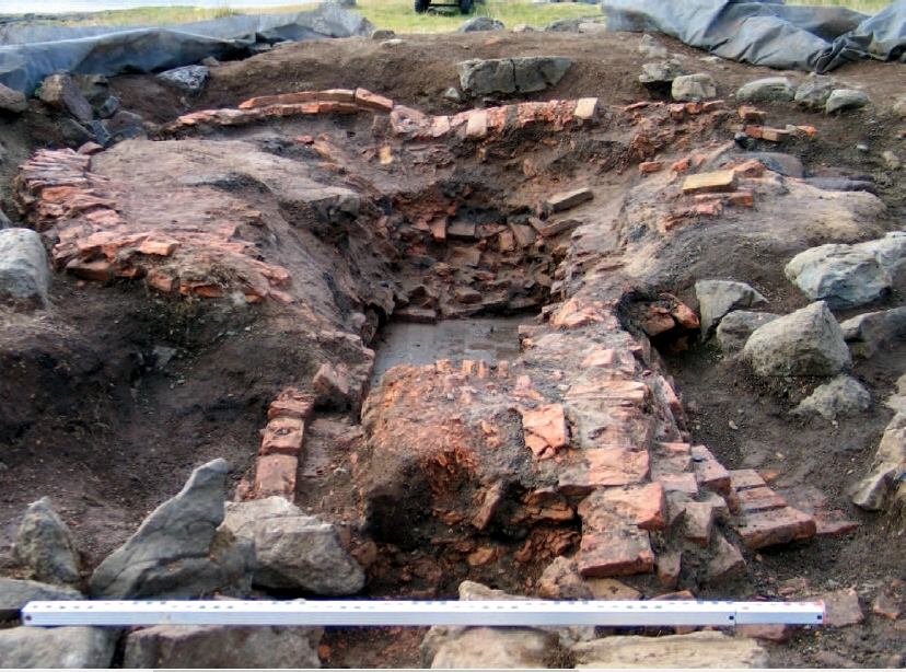 Bræðsluofn Hollendinga, fullgrafinn.